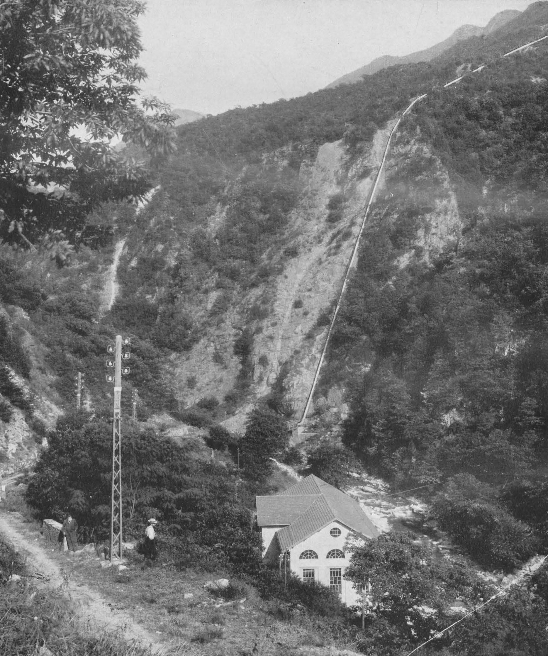 Kraftwerk Morobbia: Zentrale in Giubiasco mit Druckleitung. Aufnahme ca 1910